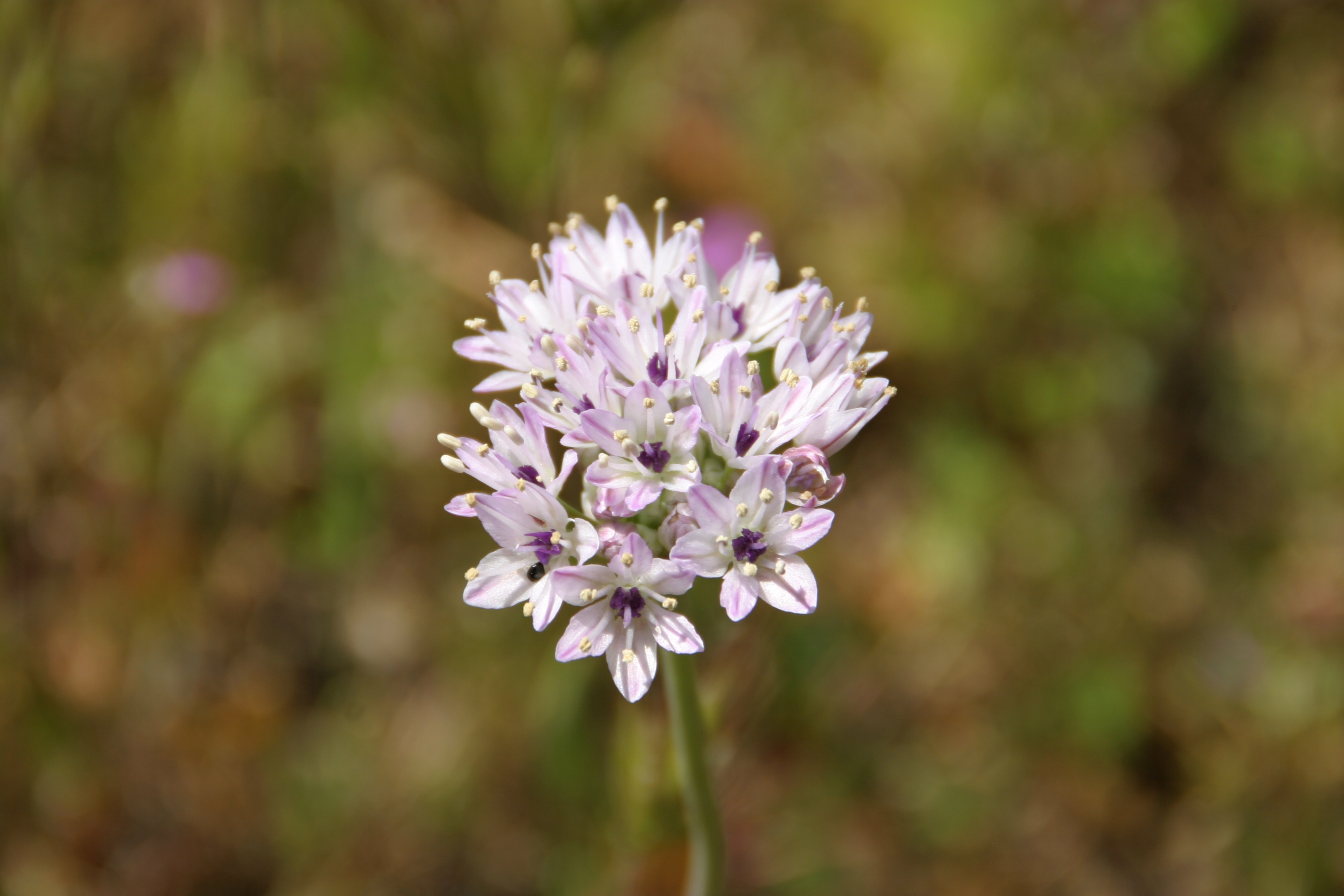 Allium lacunosum (pitted onion)